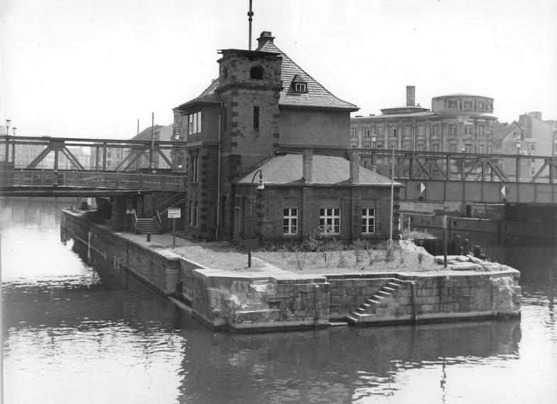 Zentralbild Quasch 7.8.1956 Alt-Berlin UBz: Das Schleusenwärterhäuschen an der Mühlendamm-Schleuse.